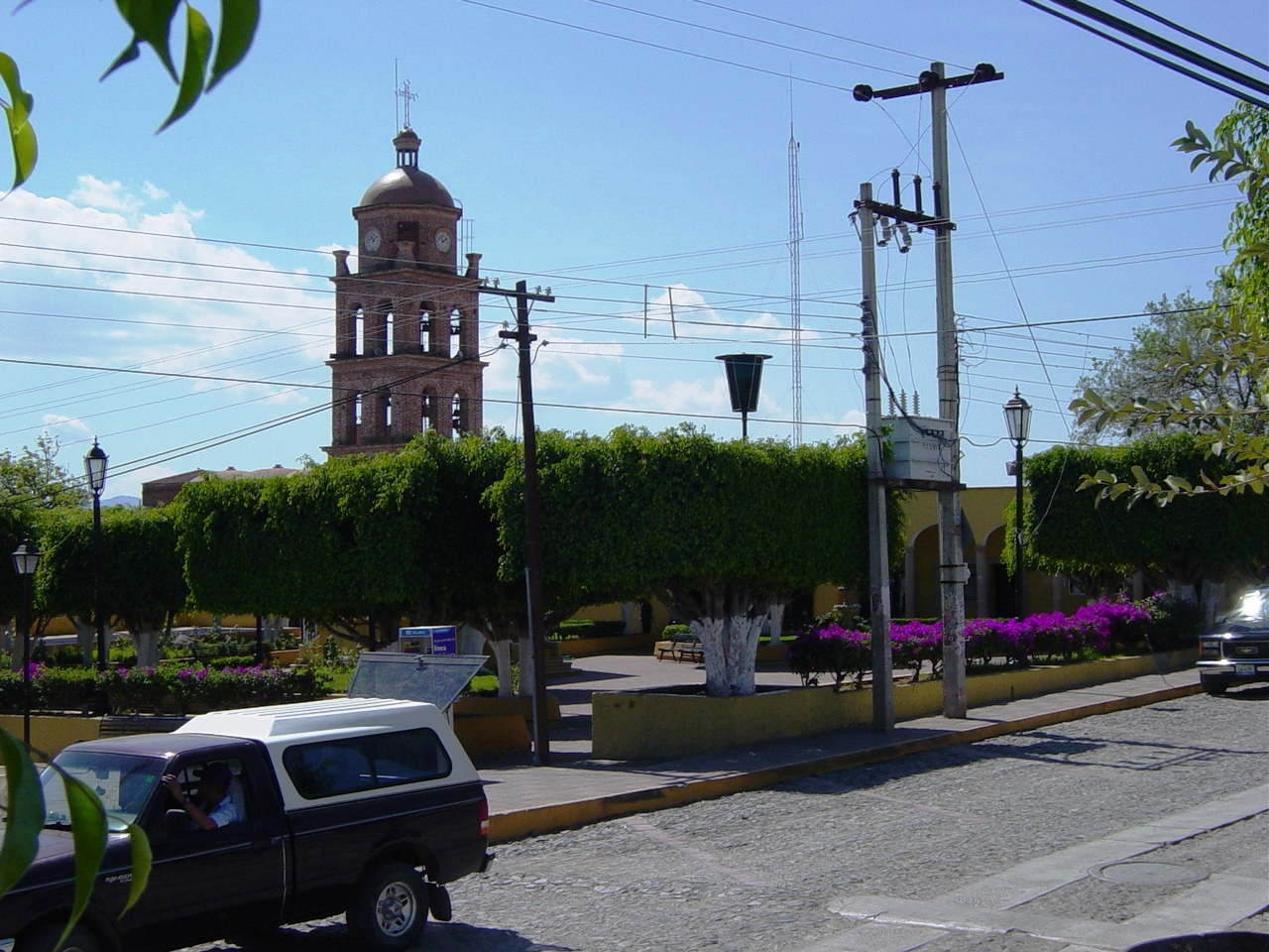 Vista de la torre de la iglesia del pueblo del sur de Jalisco de Techaluta de Montenegro.